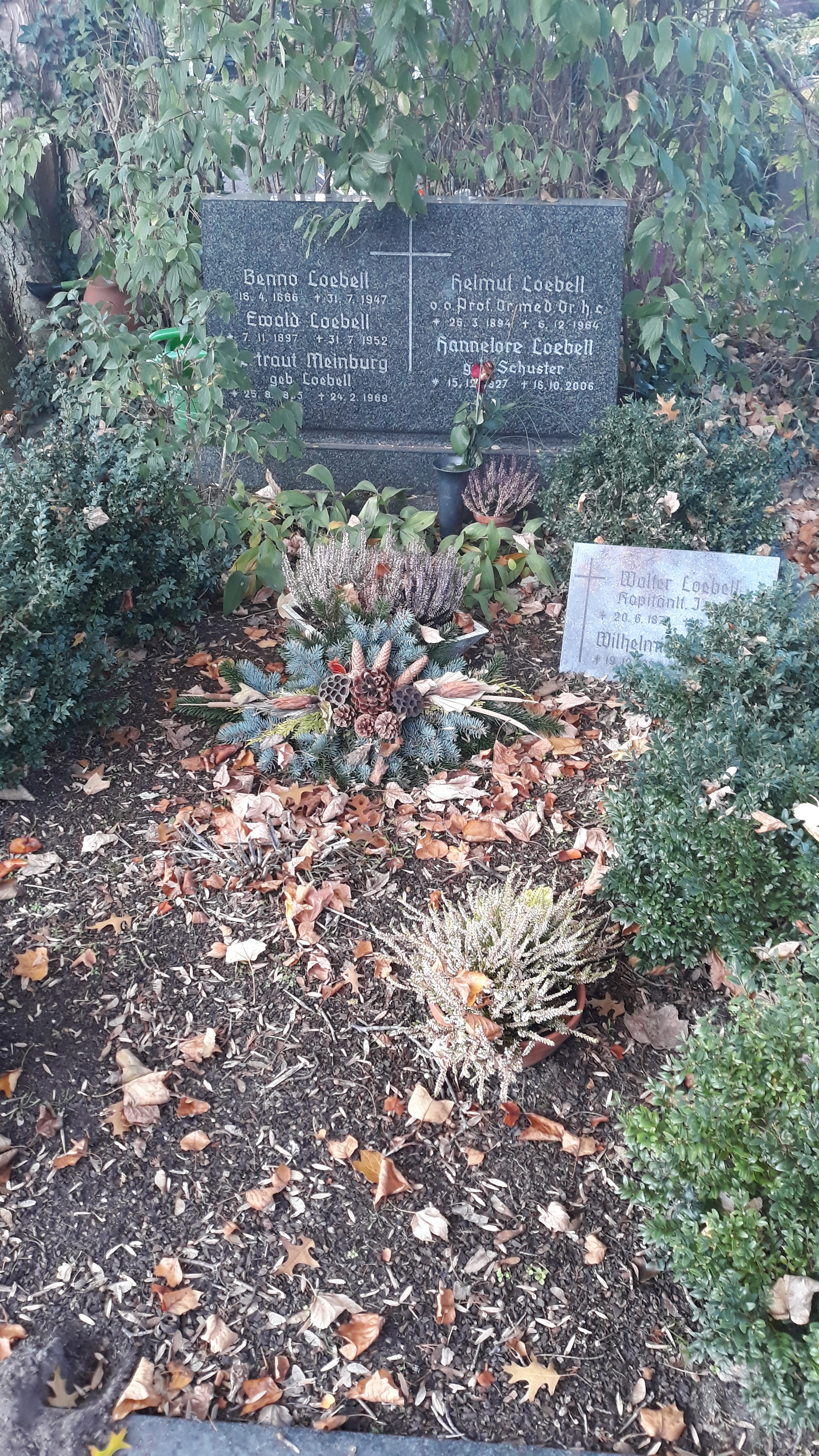 Das Grab des deutschen Mediziners Helmut Loebell im Familiengrab auf dem Zentralfriedhof Münster